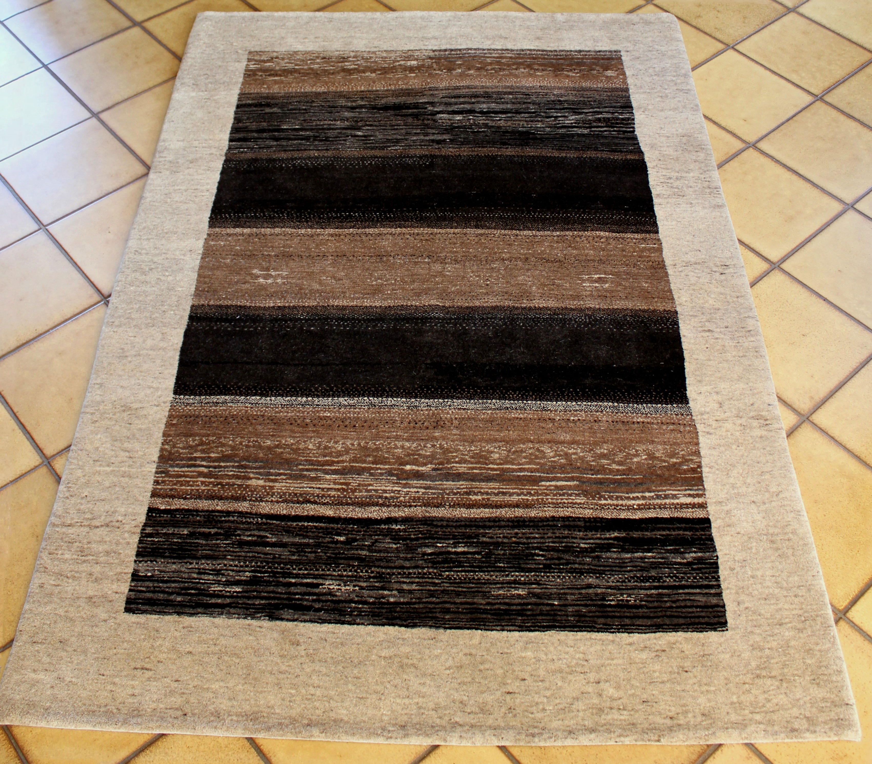 Handgeknüpter Wollteppich (Indien)